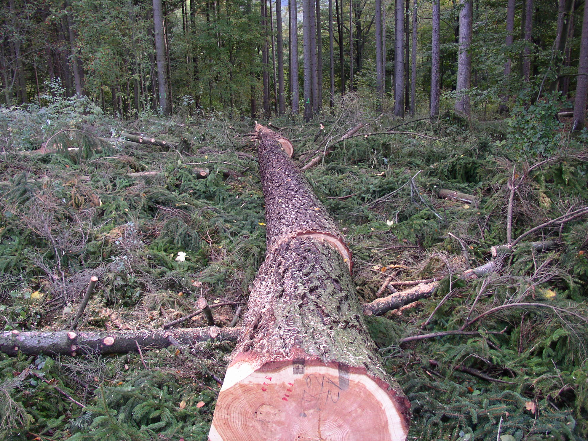 Pokácený modřín opadavý,Lužické hory, Česká republika (Larix decidua log on a bed of Abies alba or (or Picea abies) branches)